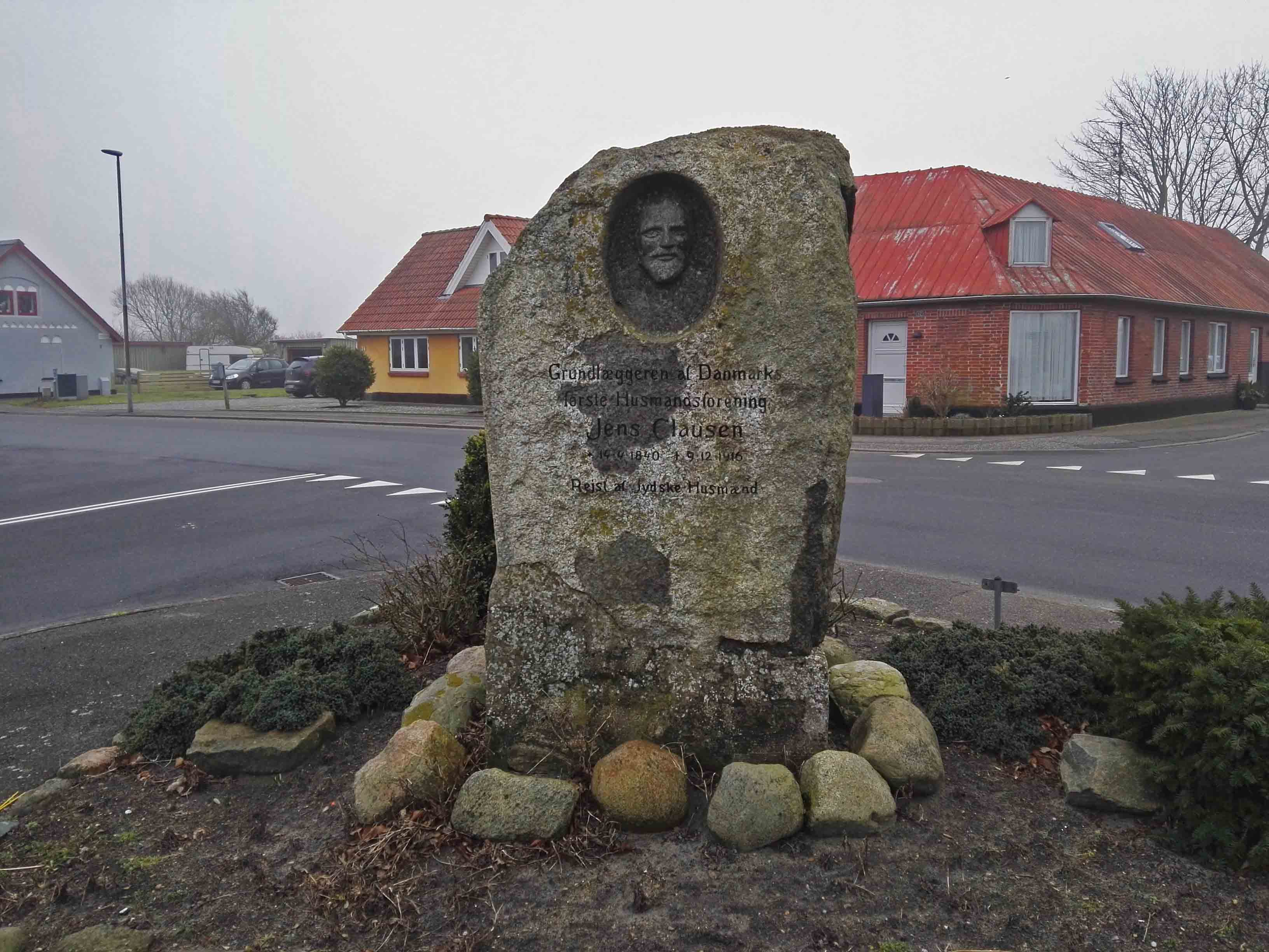 Mindesten i Klim for Jens Clausen, grundlæggeren af Danmarks første husmandsforening.